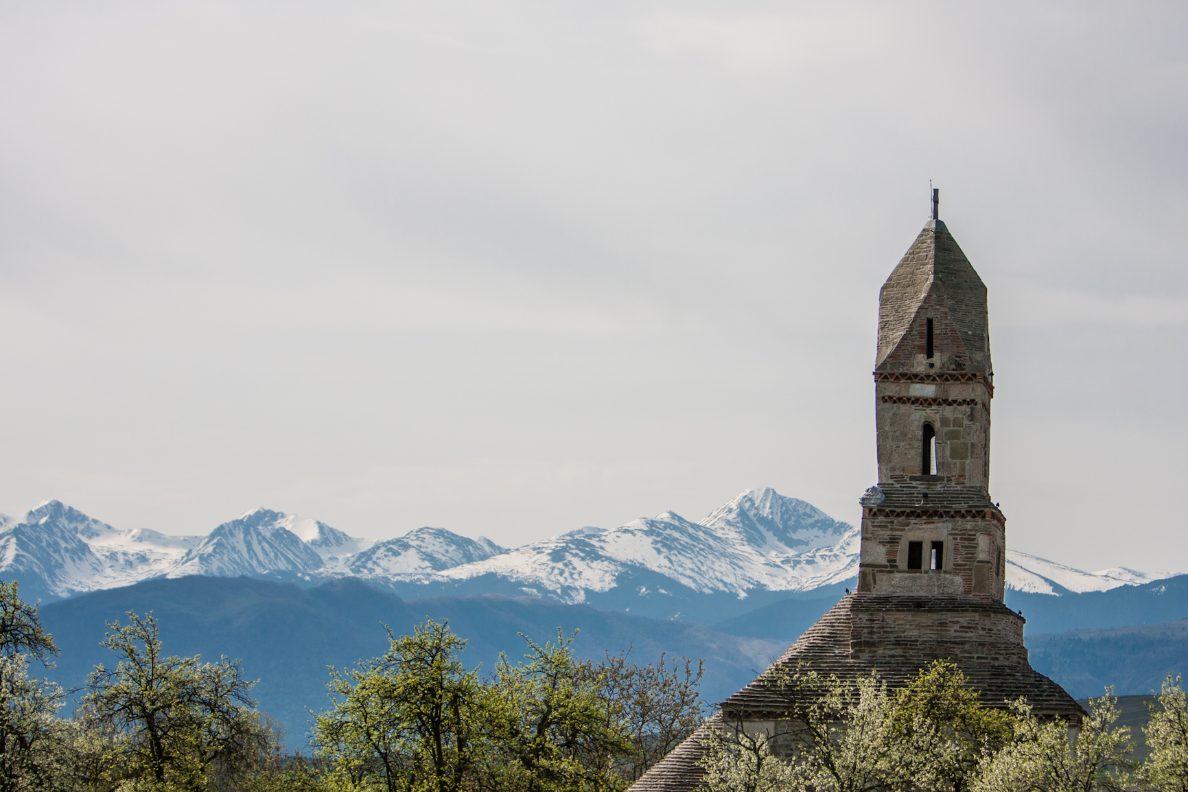 Turla bisericii "Sf. Nicolae" din Densuș cu Muntii Fagăraș în fundal